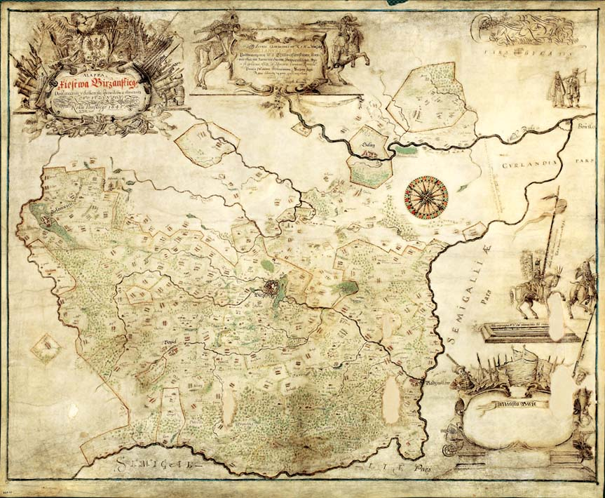 1645 m. Biržų kunigaikštystės žemėlapis